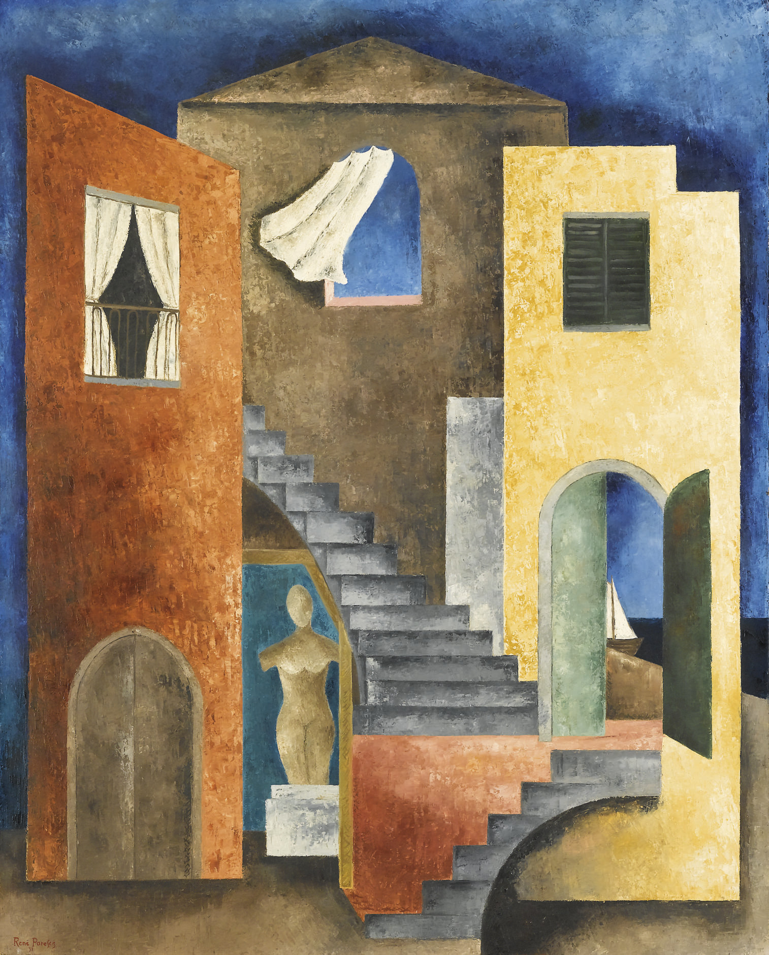 Senza titolo